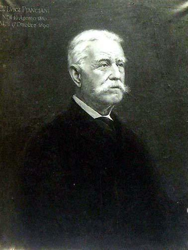 Luigi Pianciani fine 1800 pubblico dominio